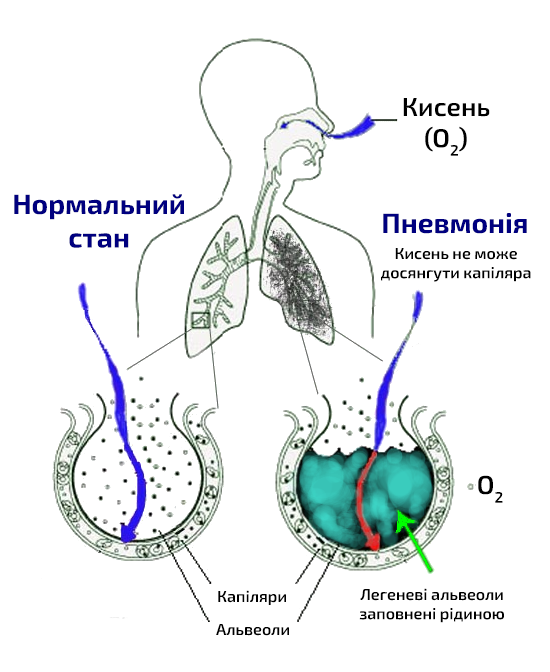 Малюнок, що зображує легеневу альвеолу здорової і хворої людини